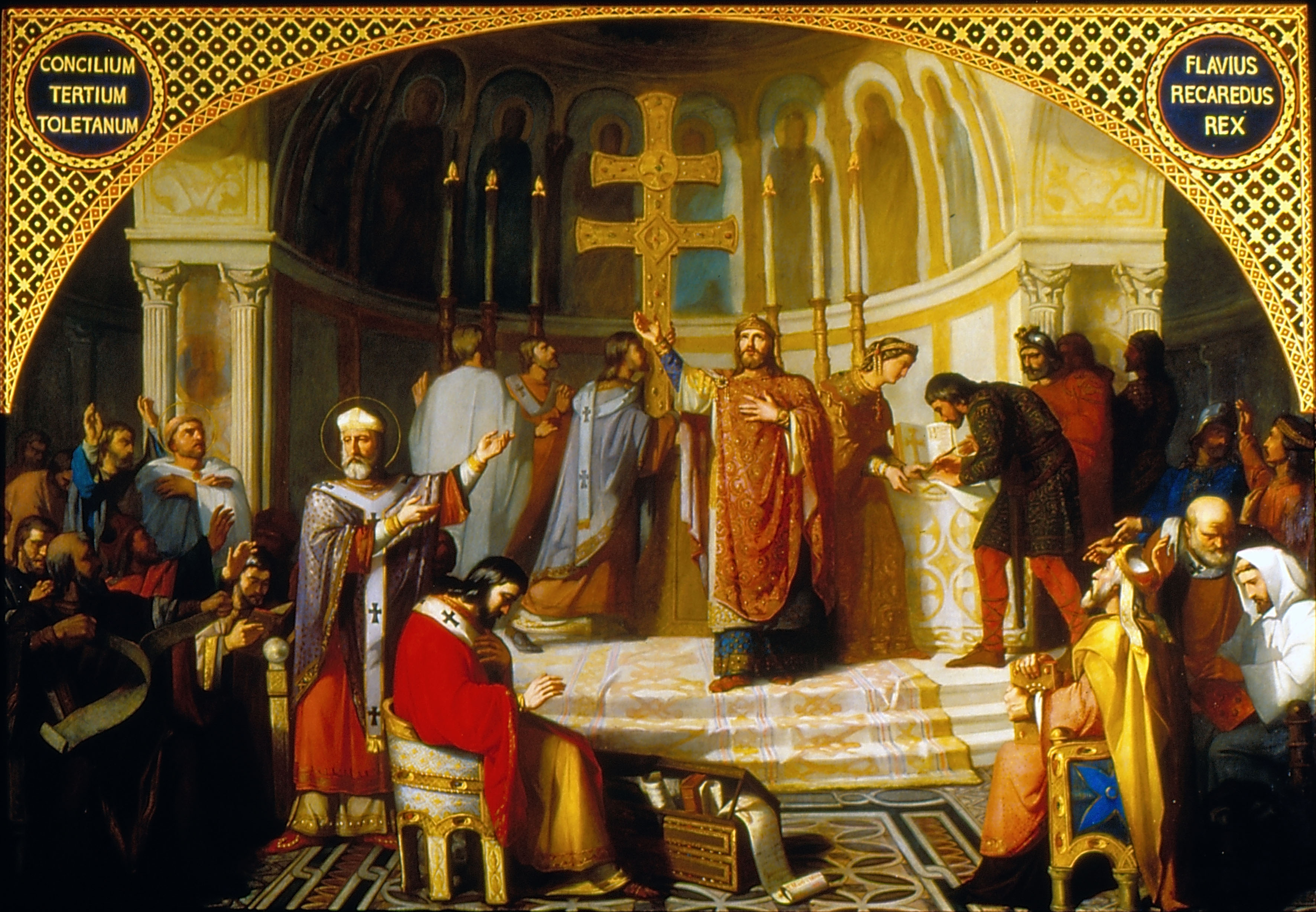 El lienzo representa el III Concilio de Toledo, celebrado en la ciudad de Toledo en el año 589, durante el reinado de Recaredo, quien abandonó el arrianismo y se convirtió al catolicismo.